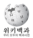 Wikipedia logo 2.0 (ko)